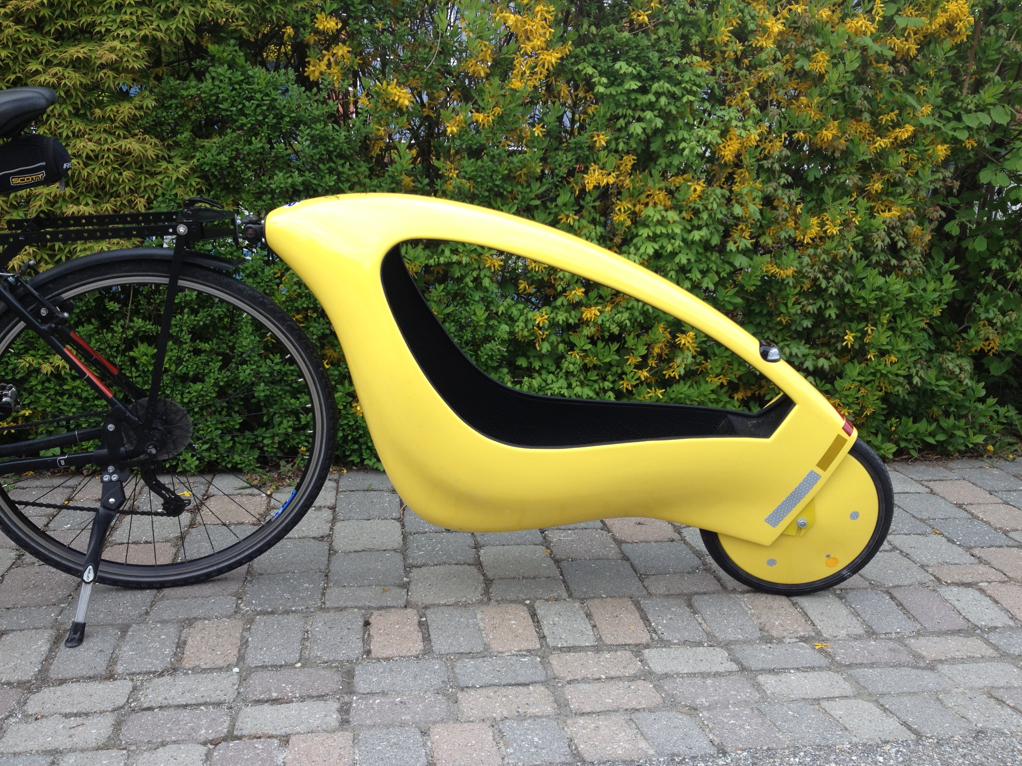 Kinderanhänger für Kinder oder Gepäck bis 25 Kg